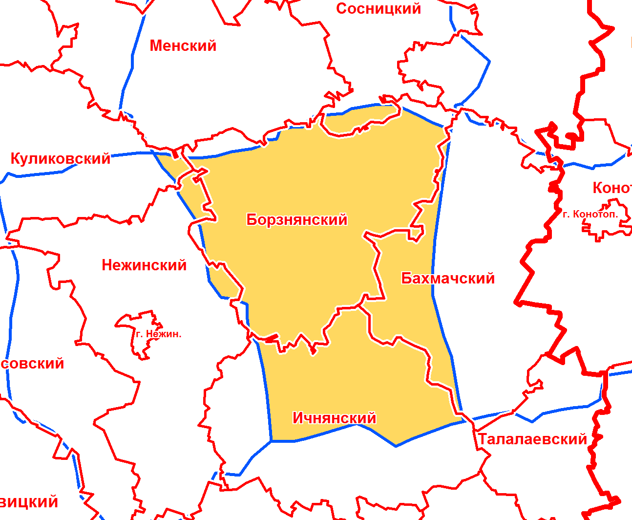 Борзнянский уезд Черниговской губернии в современной сетке районов